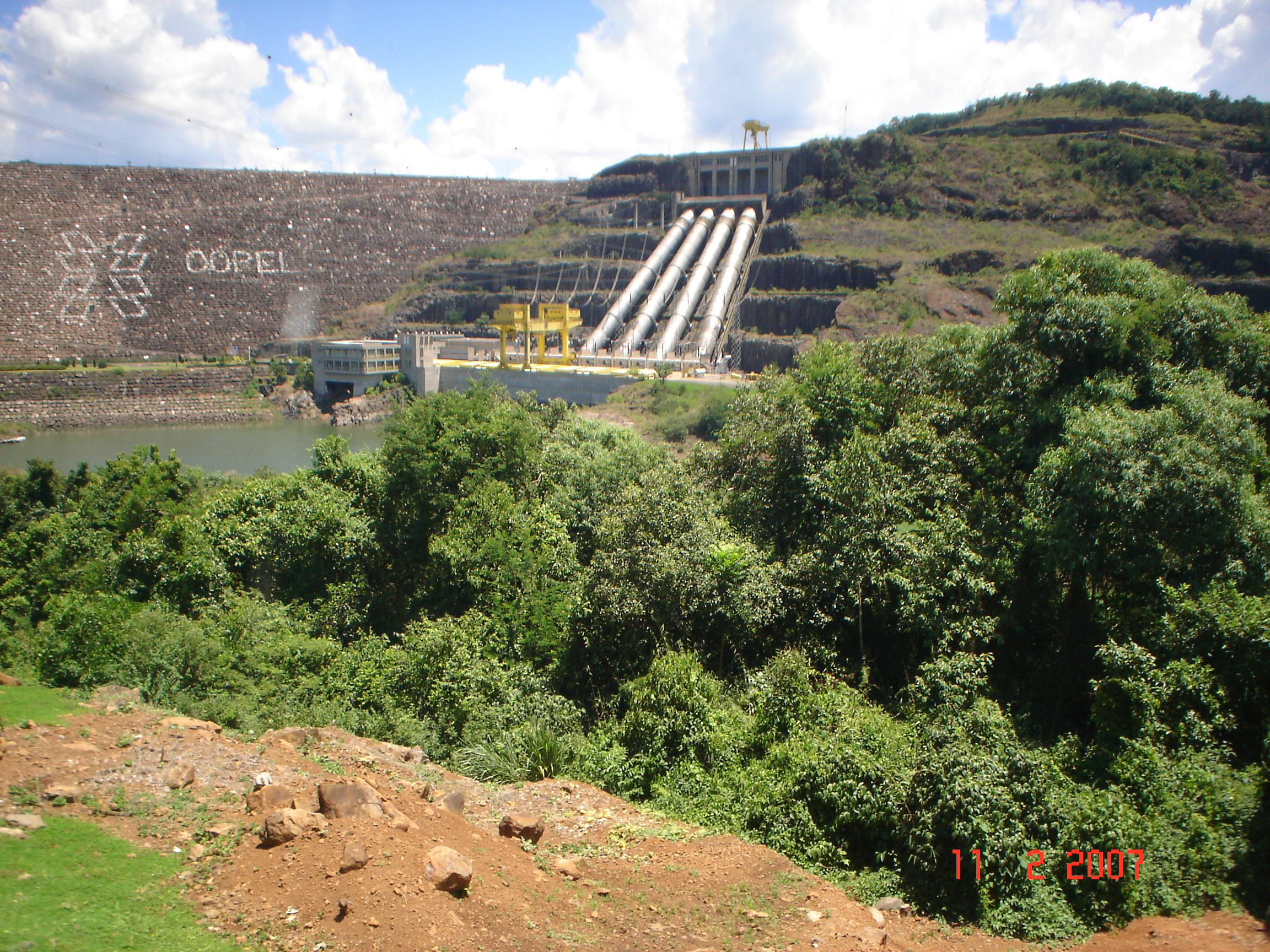 Área de uma das Usinas da Copel, Paraná, Brasil.